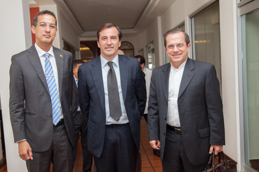 (Izq a Der) Hon Nickolas Steele Canciller de Granada, Fernando Lugris, Director Adjunto de la Politica Exterior de Uruguay, Ricardo Patiño, Canciller de Ecuador.